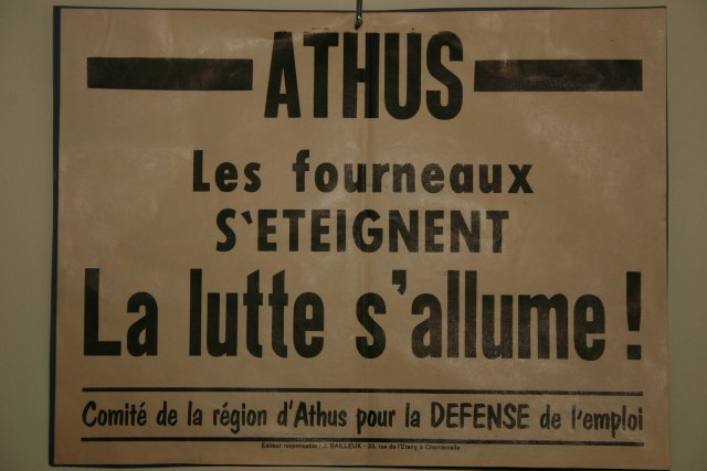 Affiche émise lors de la fermeture de l'usine en 1977